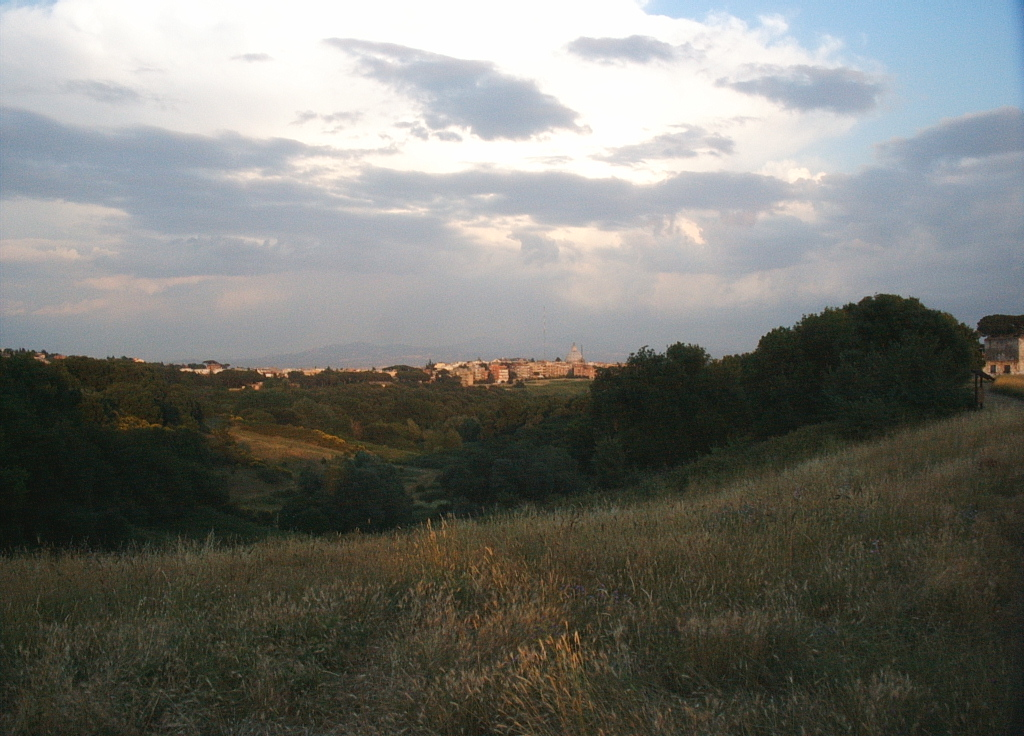 Parco del Pineto. foto personale.roma, giugno 2005 pubblico dominio